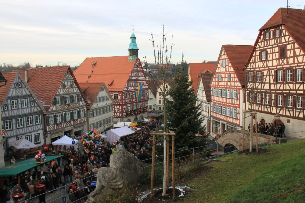 Weihnachstmarkt in Backnang 2010